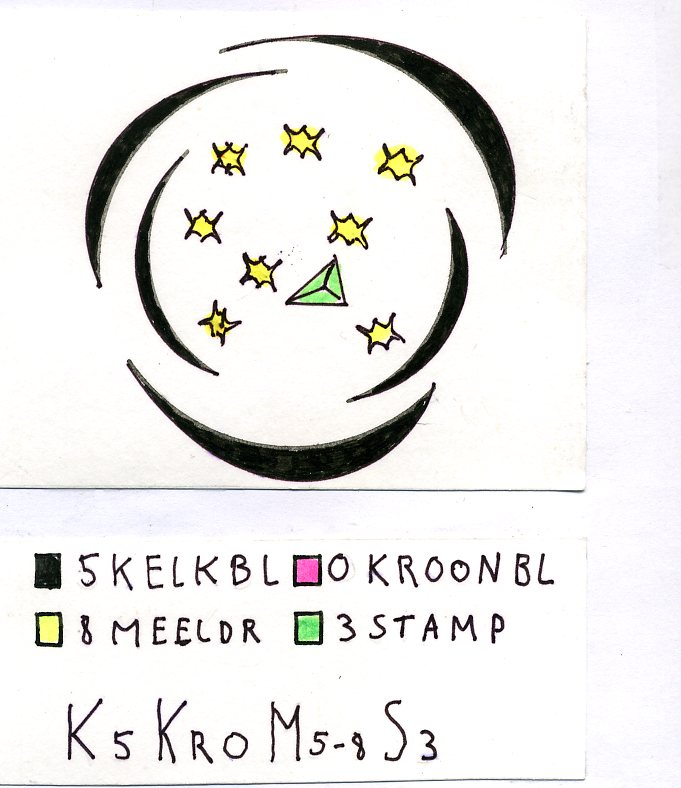 Narys kwiatowy.